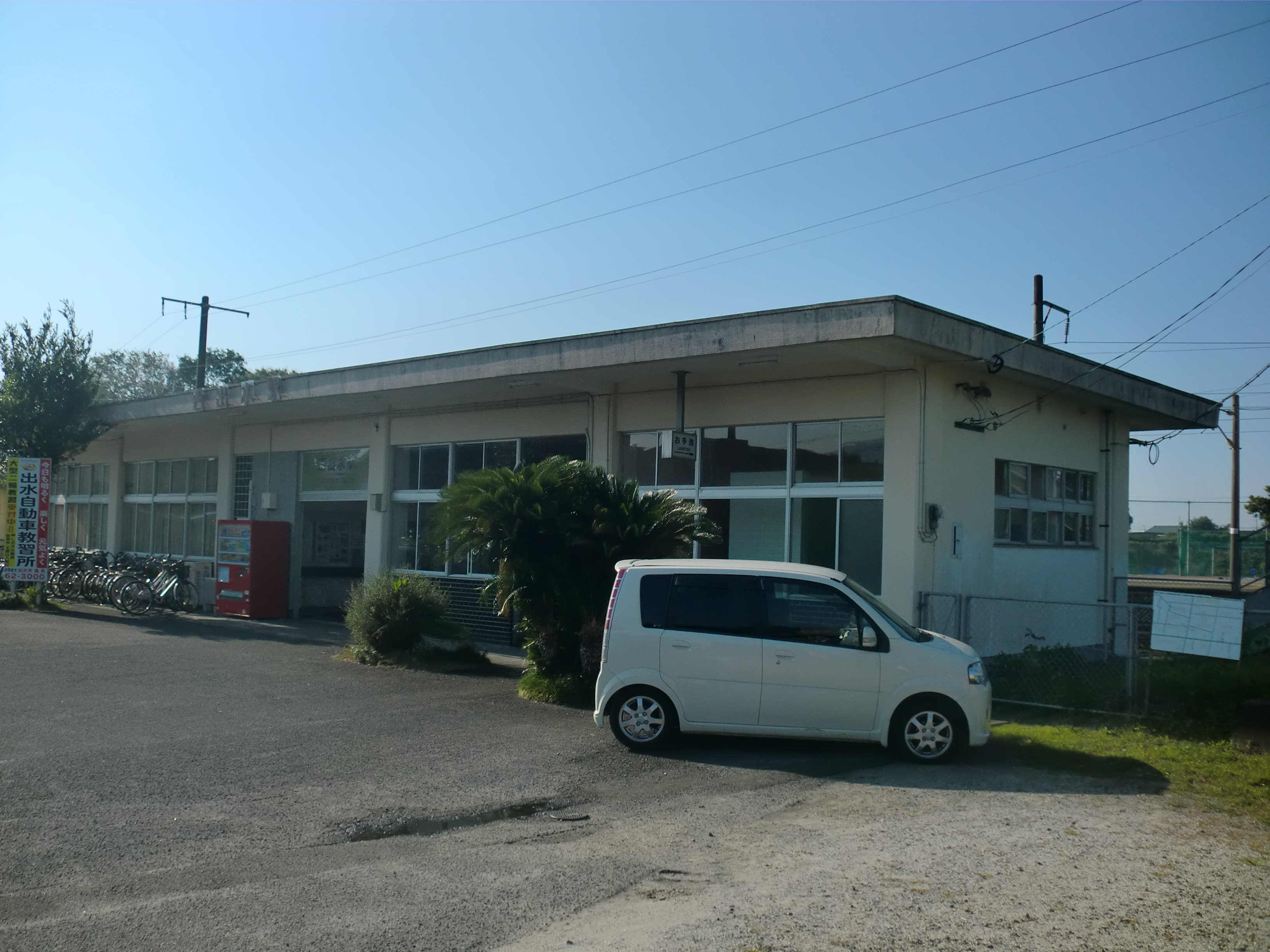 肥薩おれんじ鉄道西出水（にしいずみ）駅